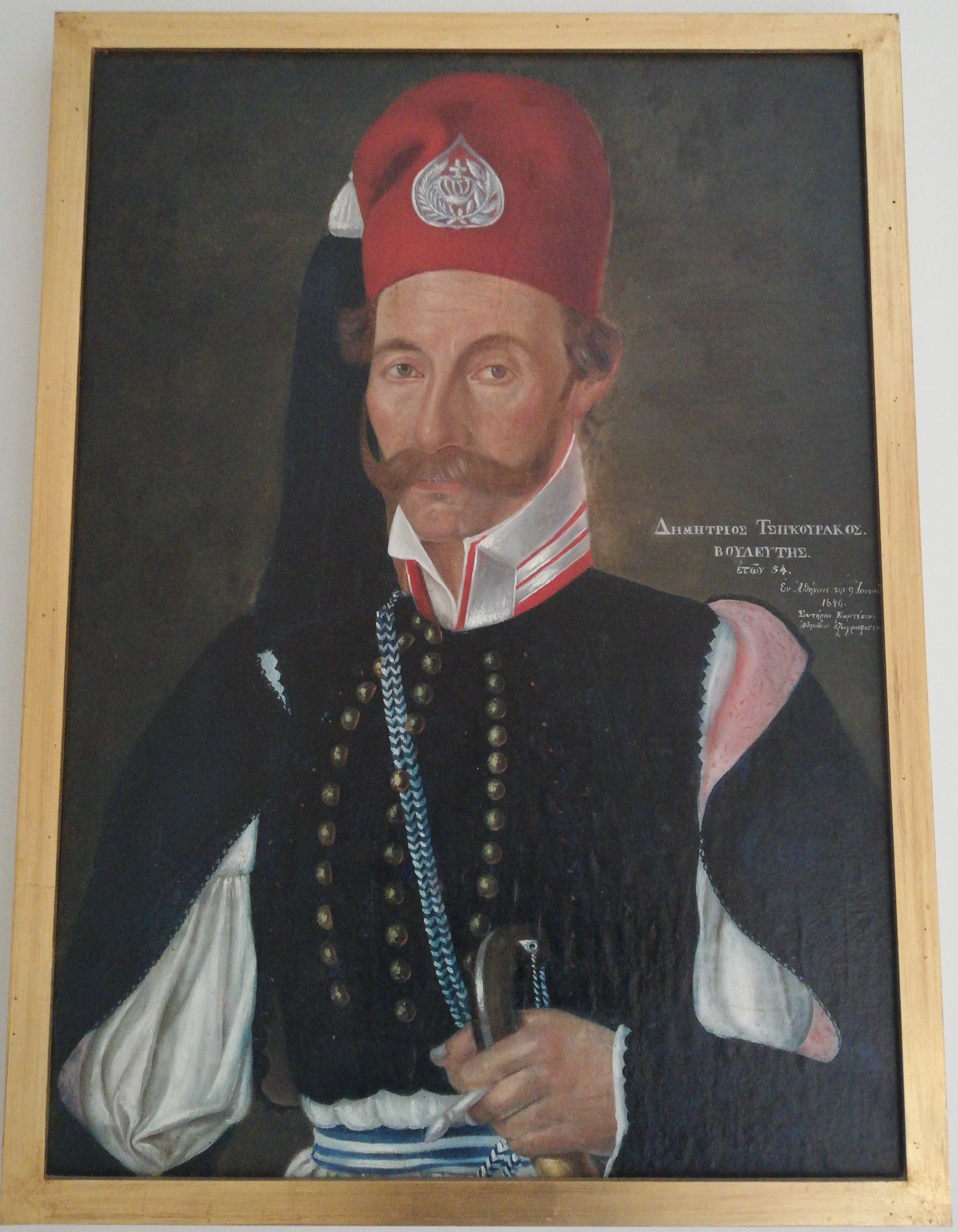 Sotiris Kartessios (1820 - deuxième moitié du XIXe siècle), huile sur toile de DimitriosTsigourakos, 1846.